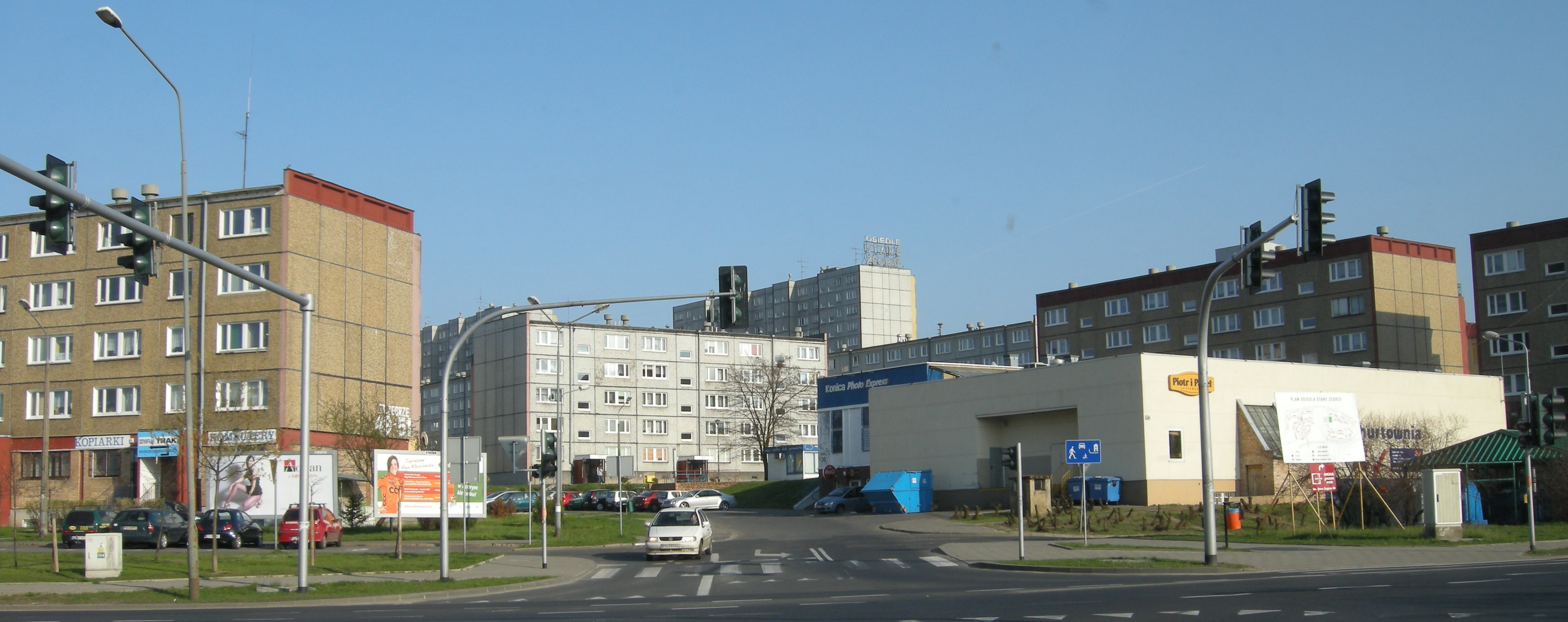 Osiedle Stare Żegrze w Poznaniu. Widok od strony skrzyżowania ulicy Inflanckiej z pawią.